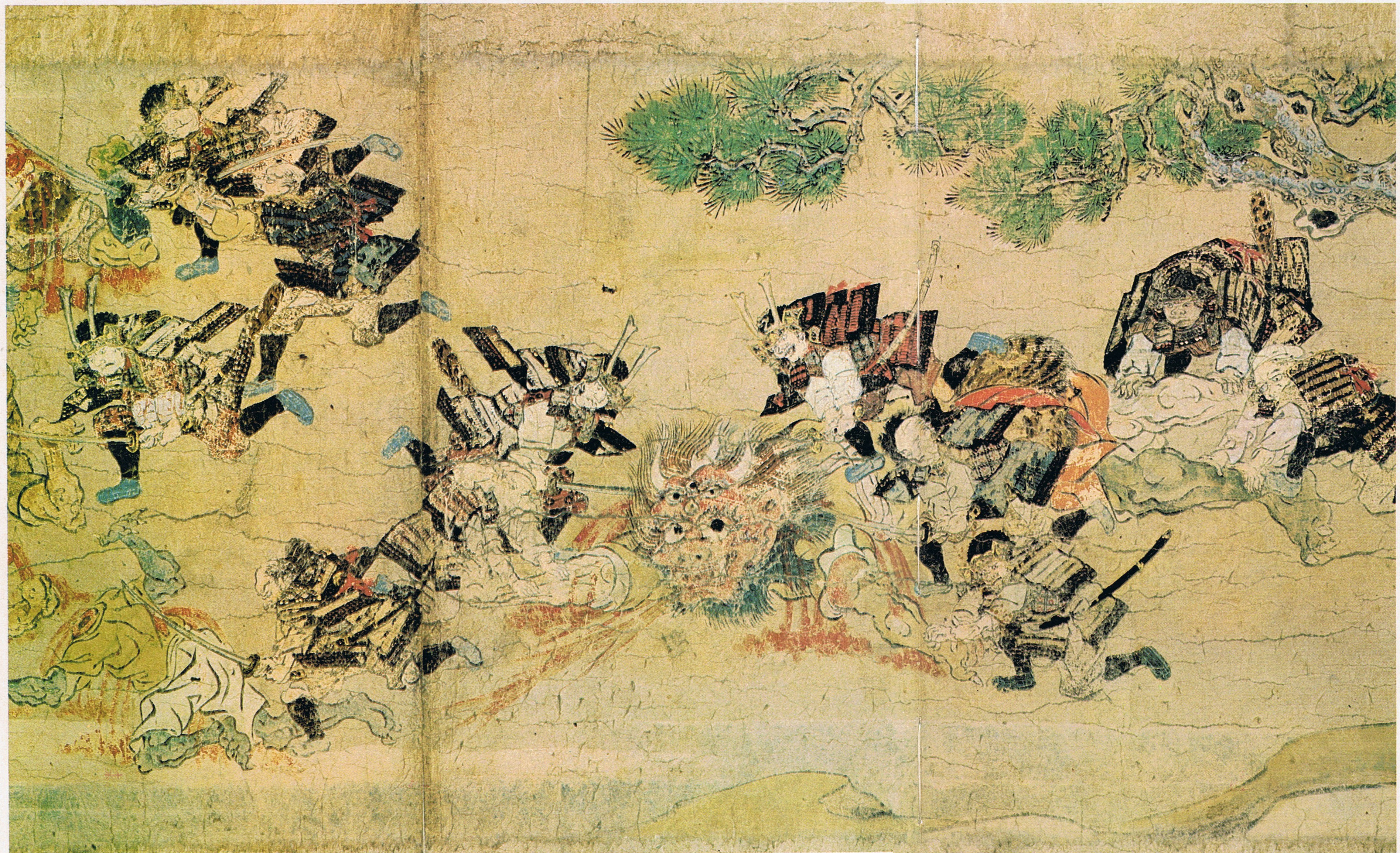 『大江山絵巻』 源頼光一行が大江山に住む酒呑童子を退治する場面。